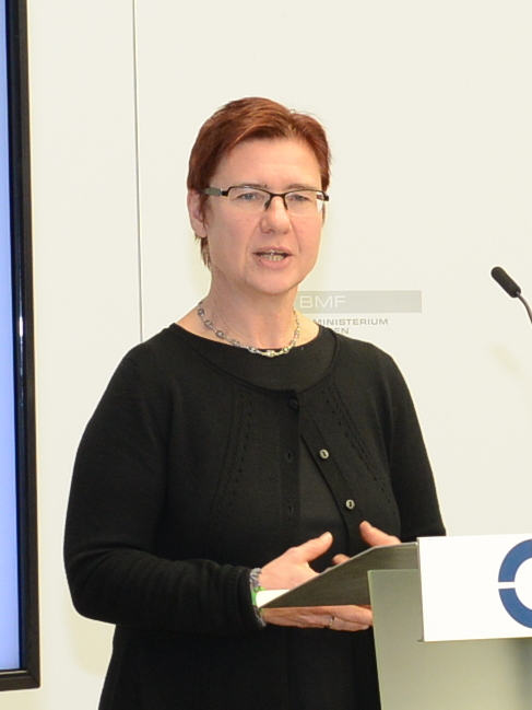 Dr. Margit Schratzenstaller präsentiert die Ergebnisse der Studie